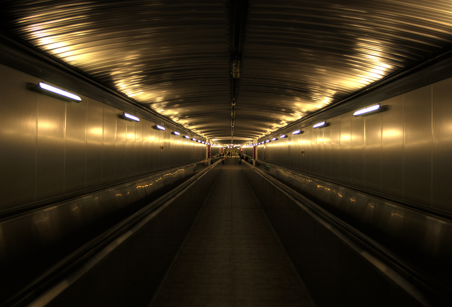 Percorso meccanizzato, mobilità alternativa Spoleto.